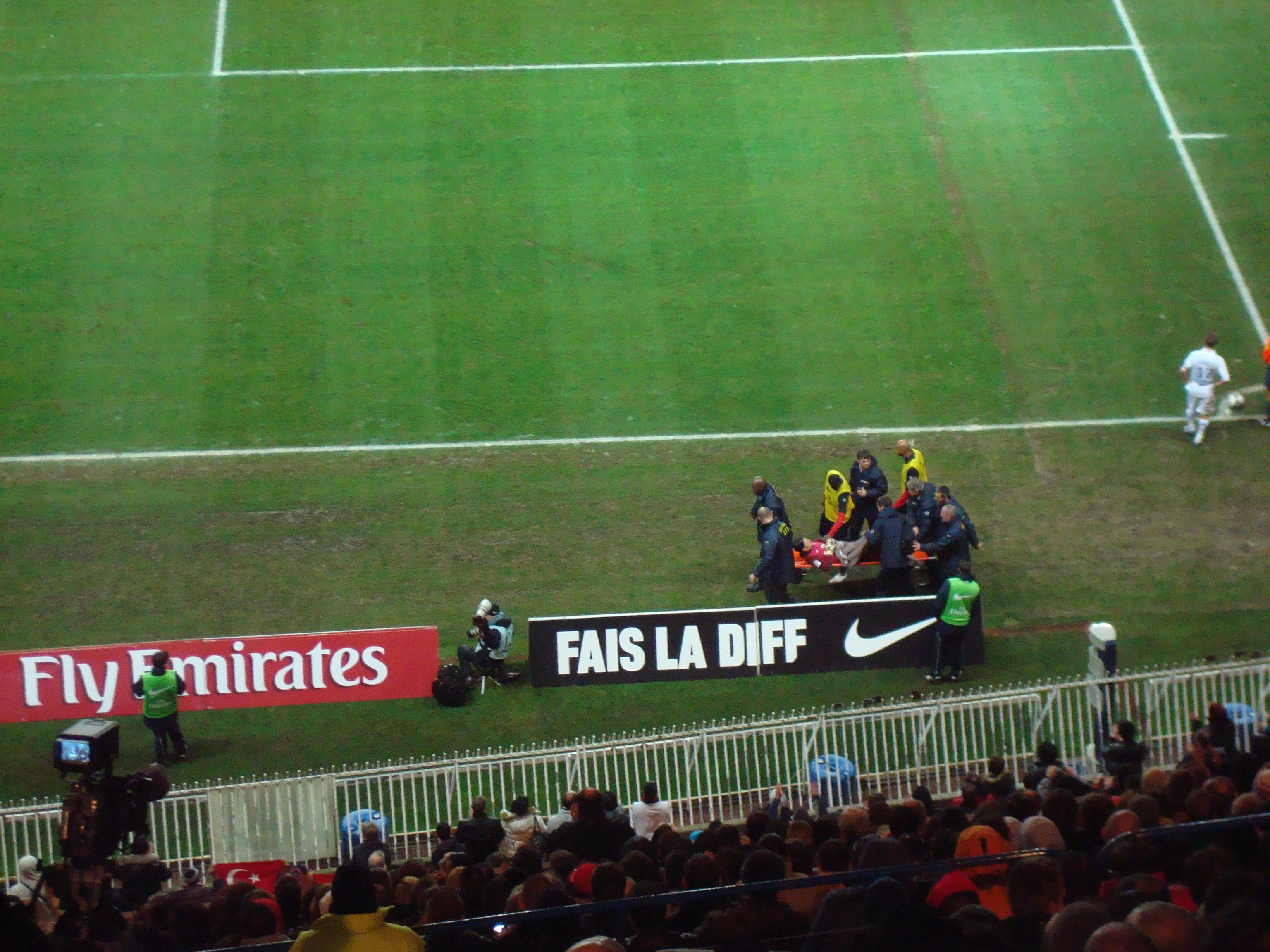 28 novembre 2009, quinzième journée de Ligue 1. Le PSG reçoit l'AJ Auxerre. Grégory Coupet se blesse en voulant sauver une balle sortant en corner. Il est ensuite évacué sur une civière.